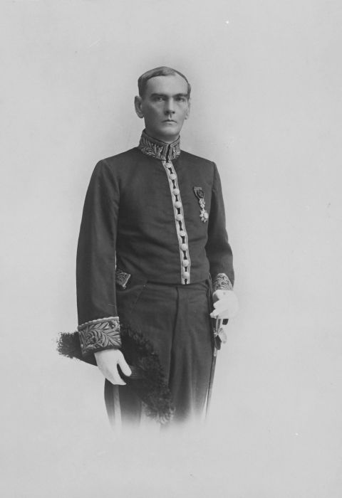 foto. Portret van de heer Bijleveld, Gouverneur van Jogjakarta